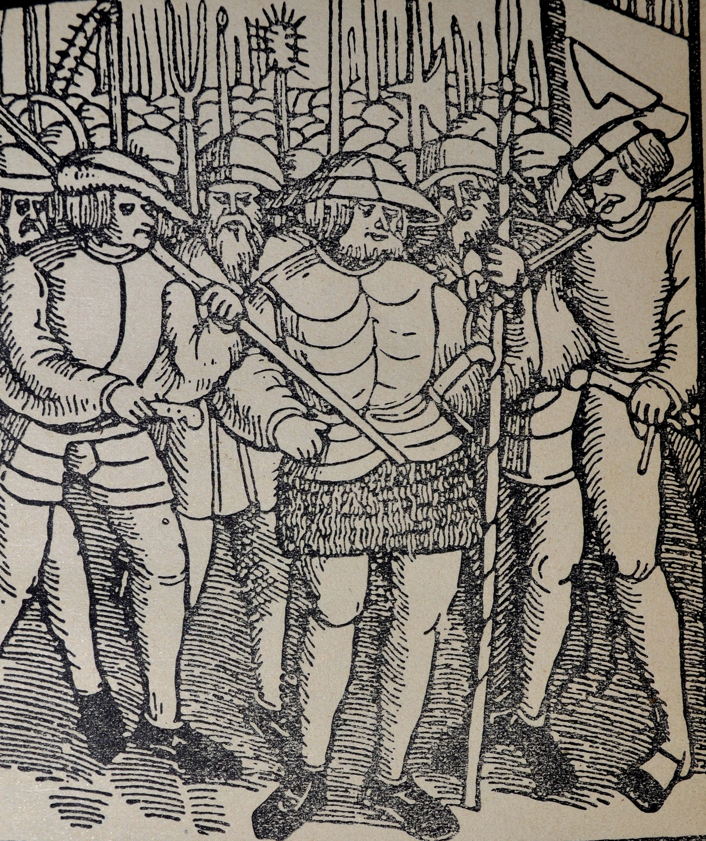 Oboroženi kmetje, lesorez iz knjige Rosenow: Kulturbilder aus den Religionskämpfen des 16. und 17. Jahrhunderts, objavljen v knjigi Bratka Krefta Velika puntarija kot ilustracija k 2. dejanju.